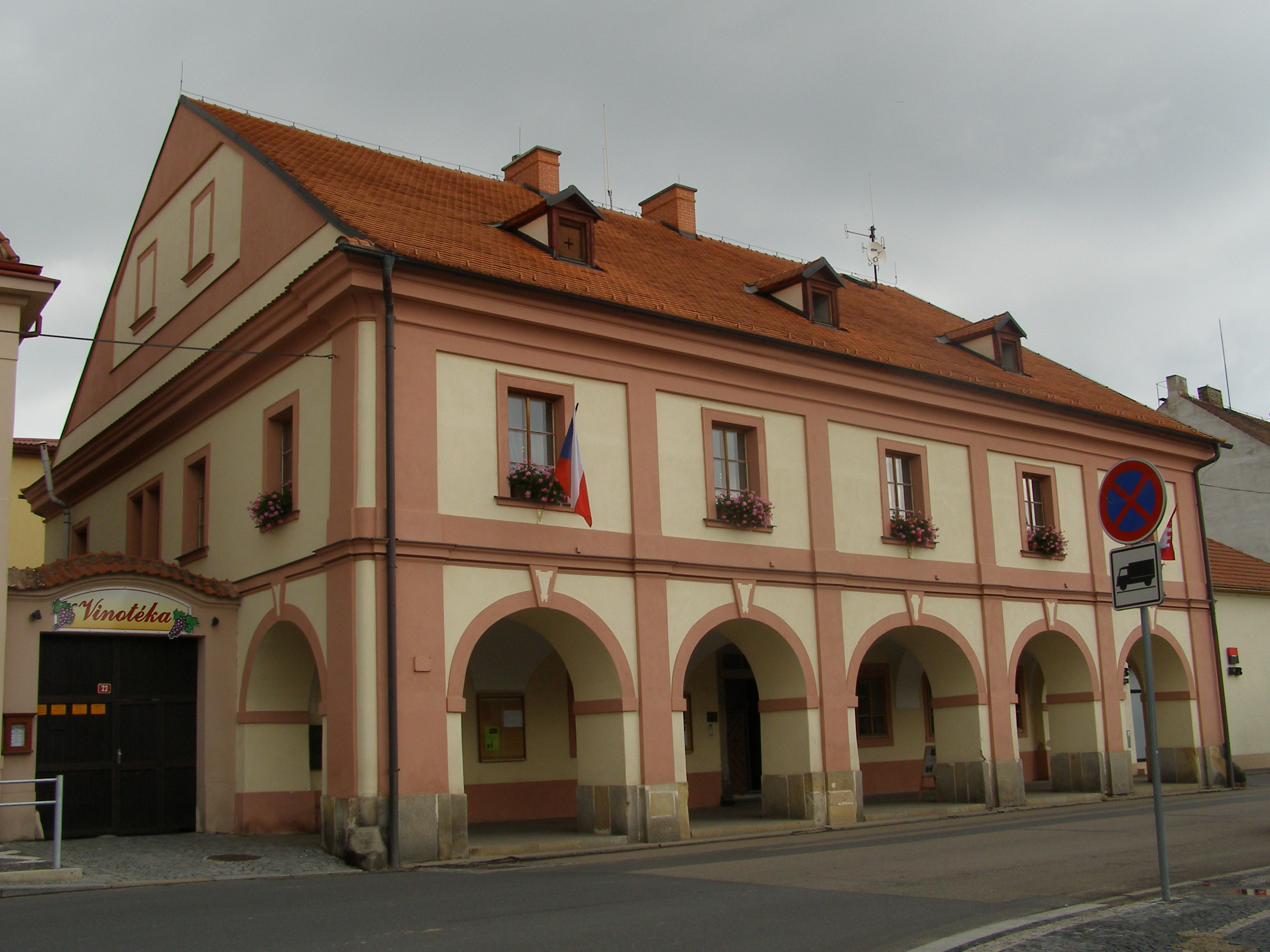 Radnice (Lysá nad Labem), Husovo nám. 23/1, Lysá nad Labem